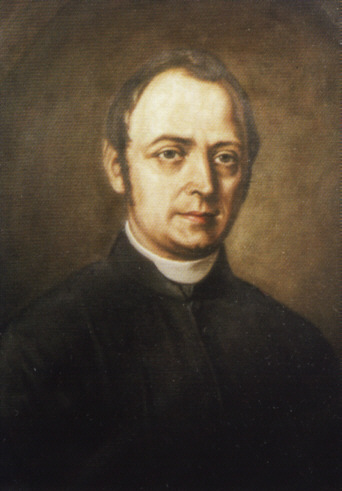 Johannes Schneider (1824-1876), Pfarrer und Ordensgründer, Diener Gottes (2001)